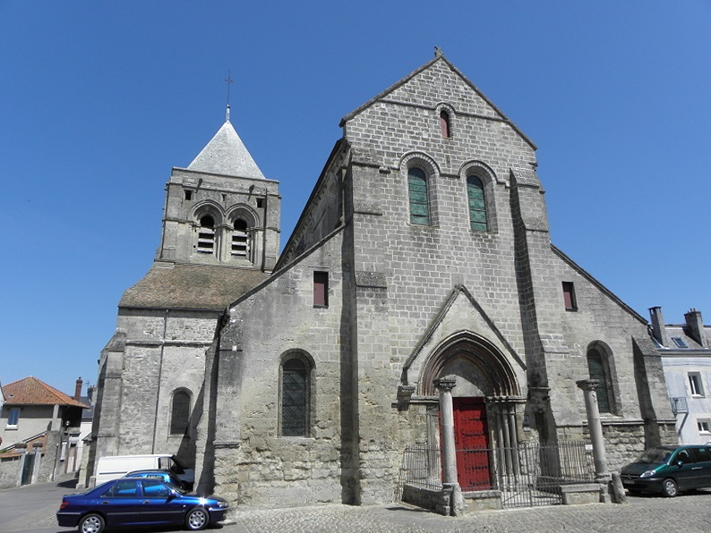 Façade occidentale de l'église Notre-dame de Bruyères-et-Montbérault (02). .